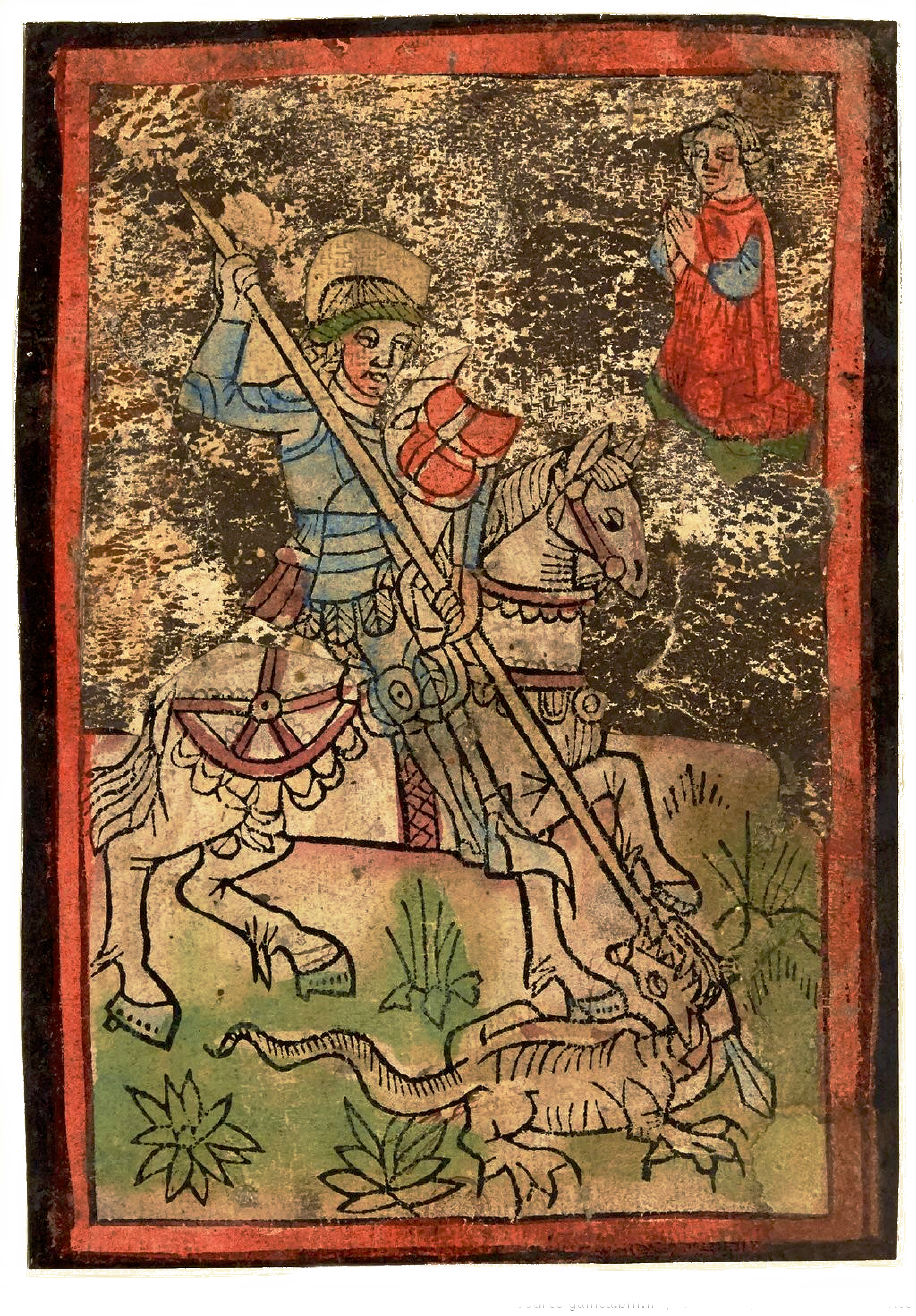 Saint Georges terrassant le dragon, Estampe, Gravure sur bois, Colorié. Réalisée en Bourgogne au XV, entre 1450 et 1465, vers 1430